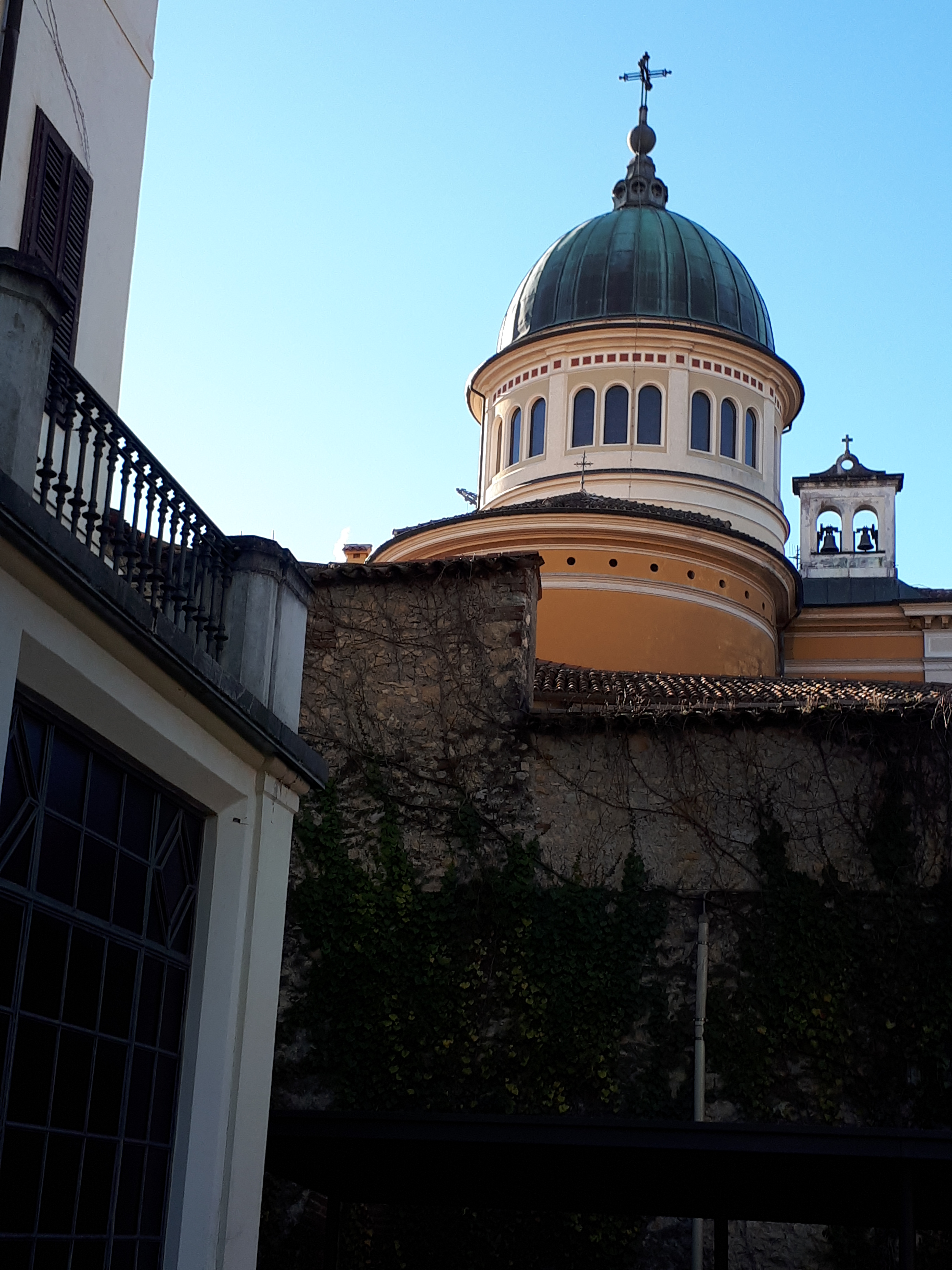 Cupola e campanile della chiesa di sant'Antonio abate di Schio